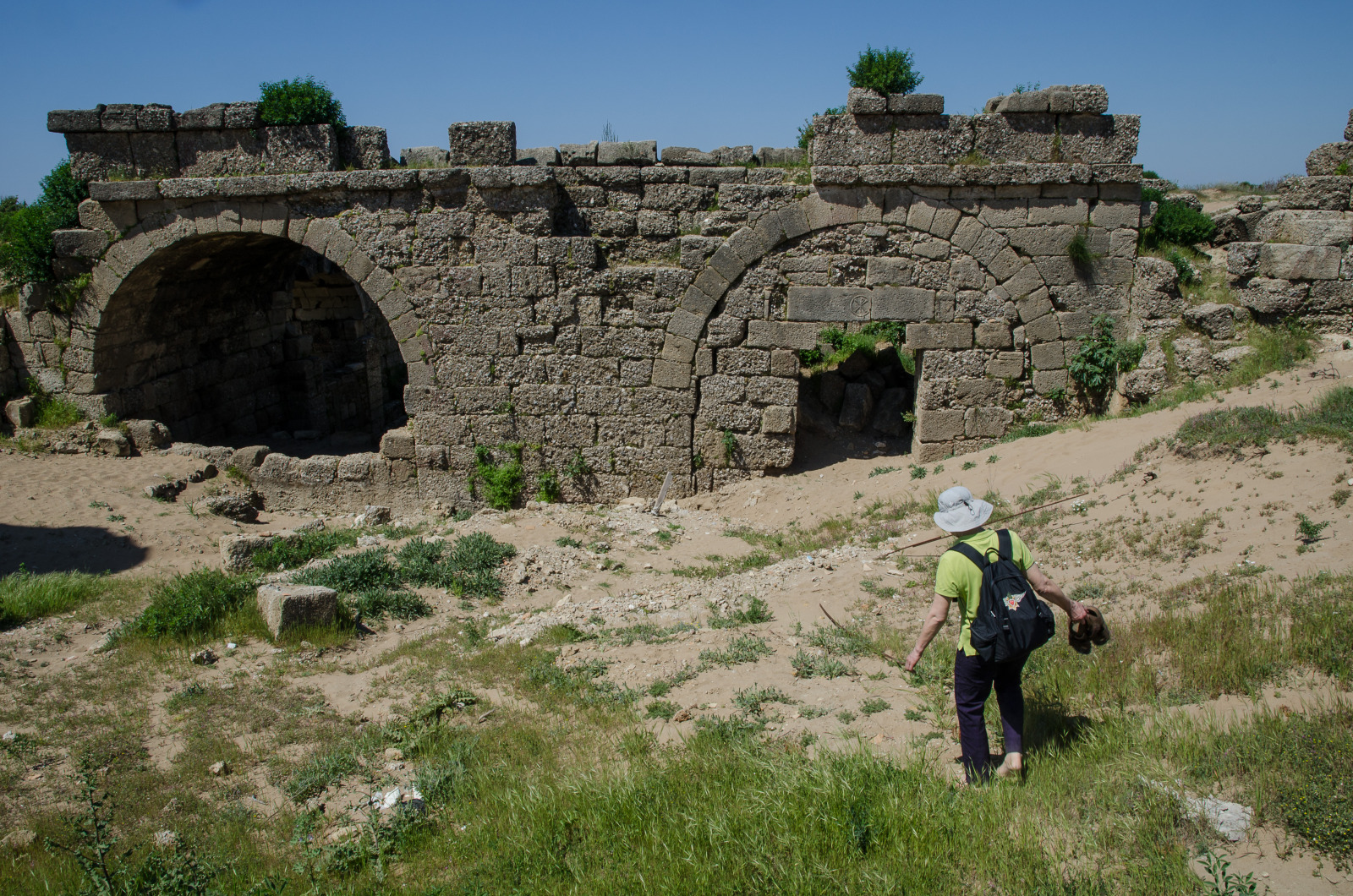 Teilweise schon wieder von Sand verschüttet. Der rechte Bogen ist zu einer Tür verkleinert, die möglicherweise zu einer christlichen Kapelle führte.